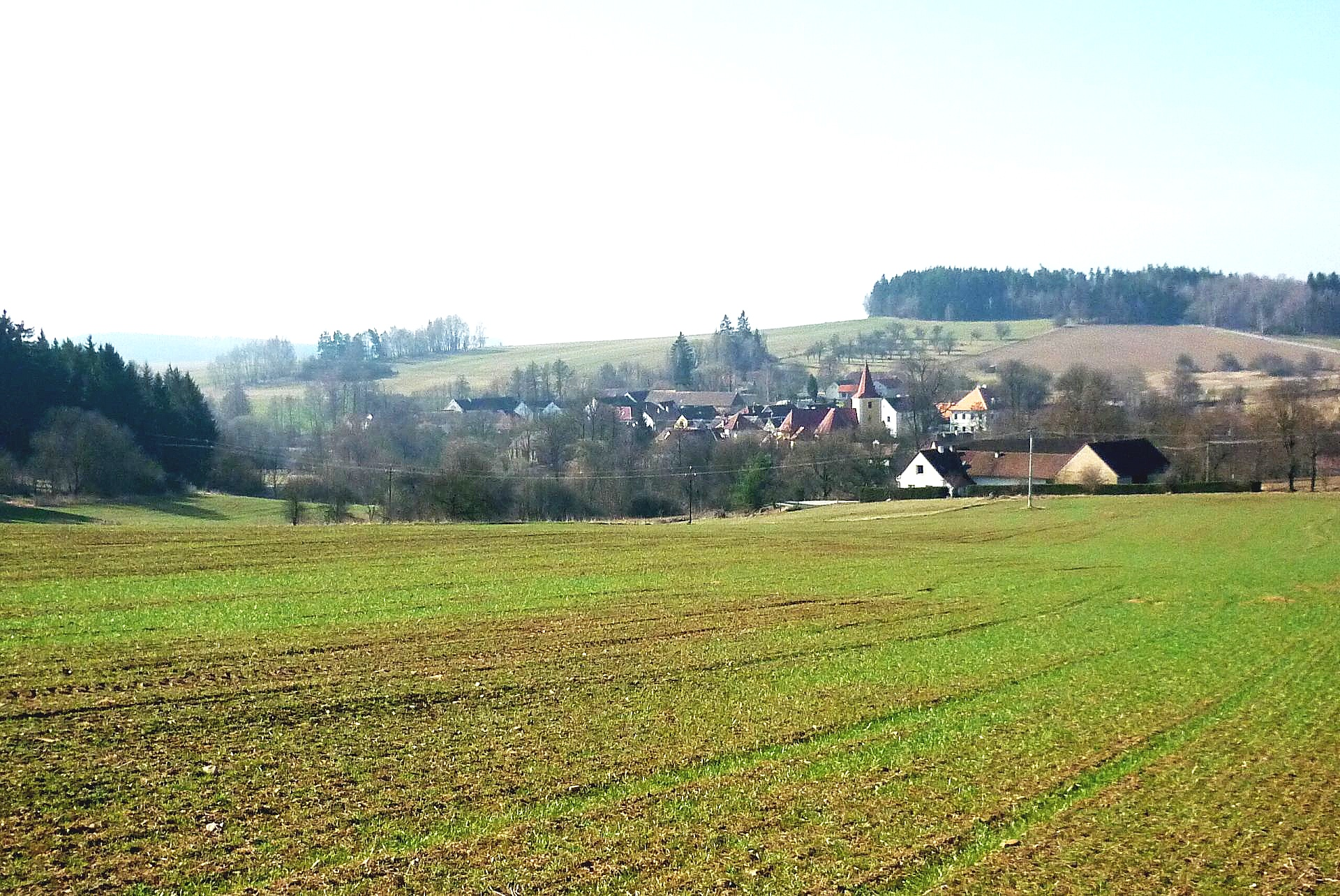 Kostelní Myslová